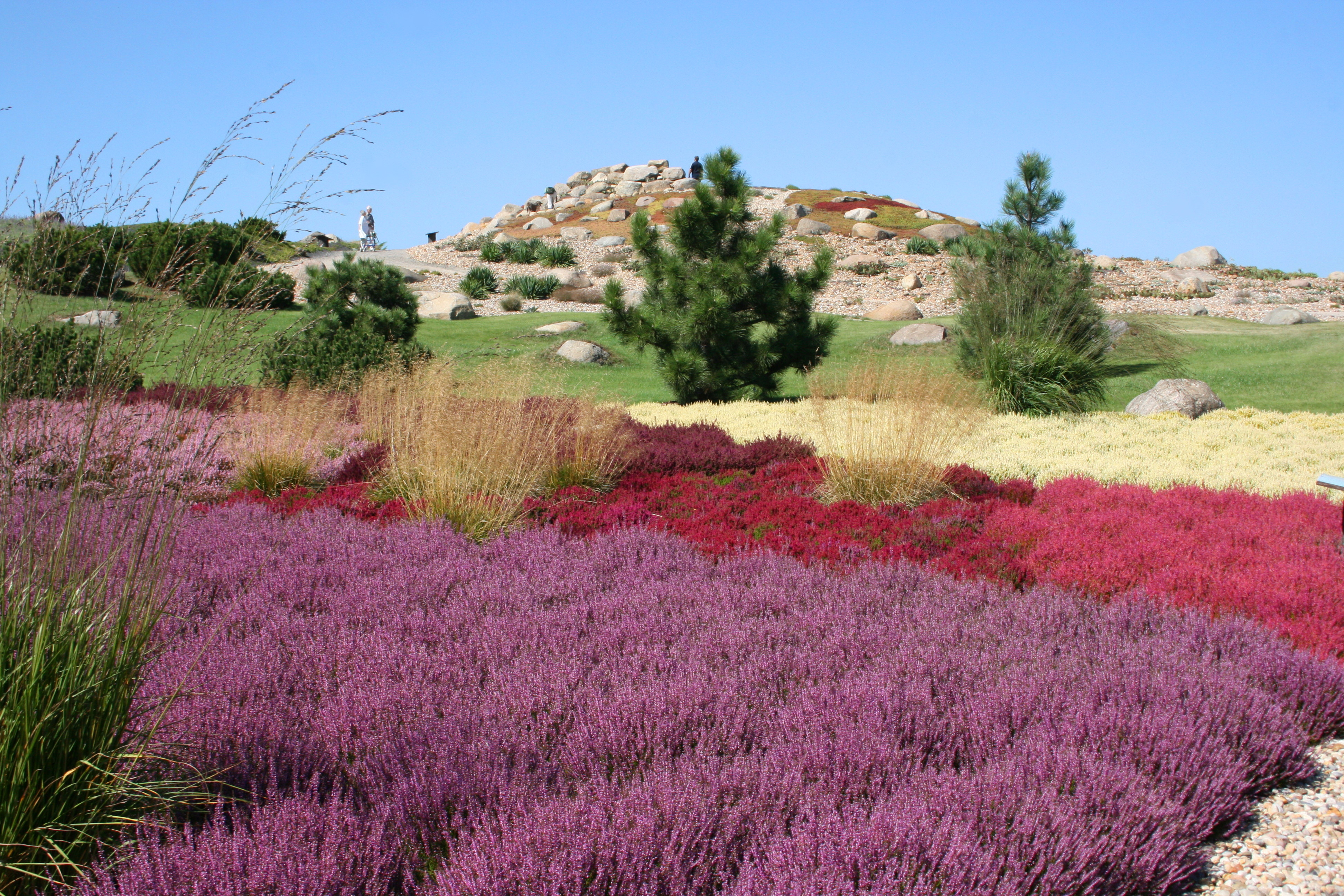 Findlingspark Nochten in Boxberg/O.L.-Nochten